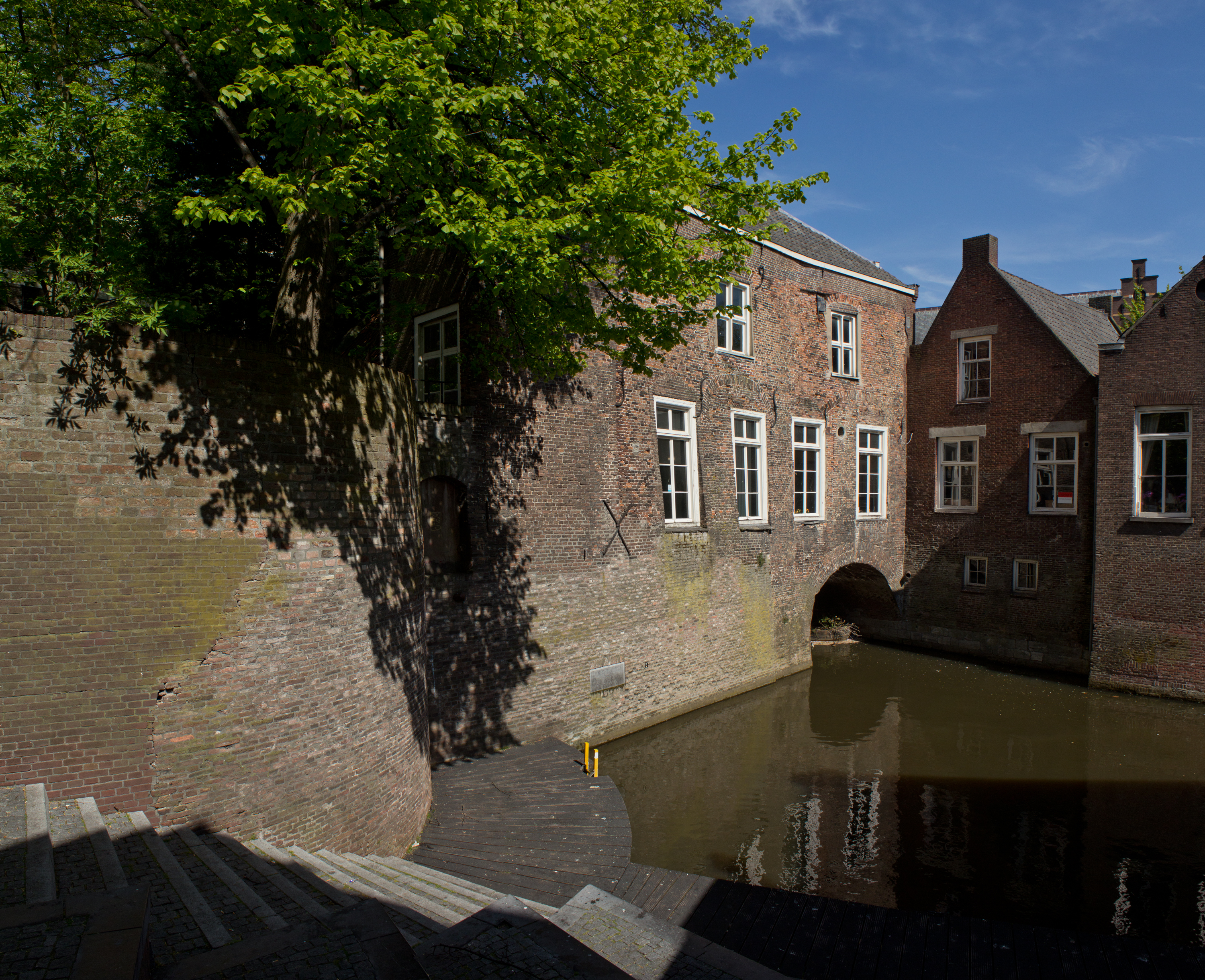 Deel van de eerste stadsmuur van Den Bosch.